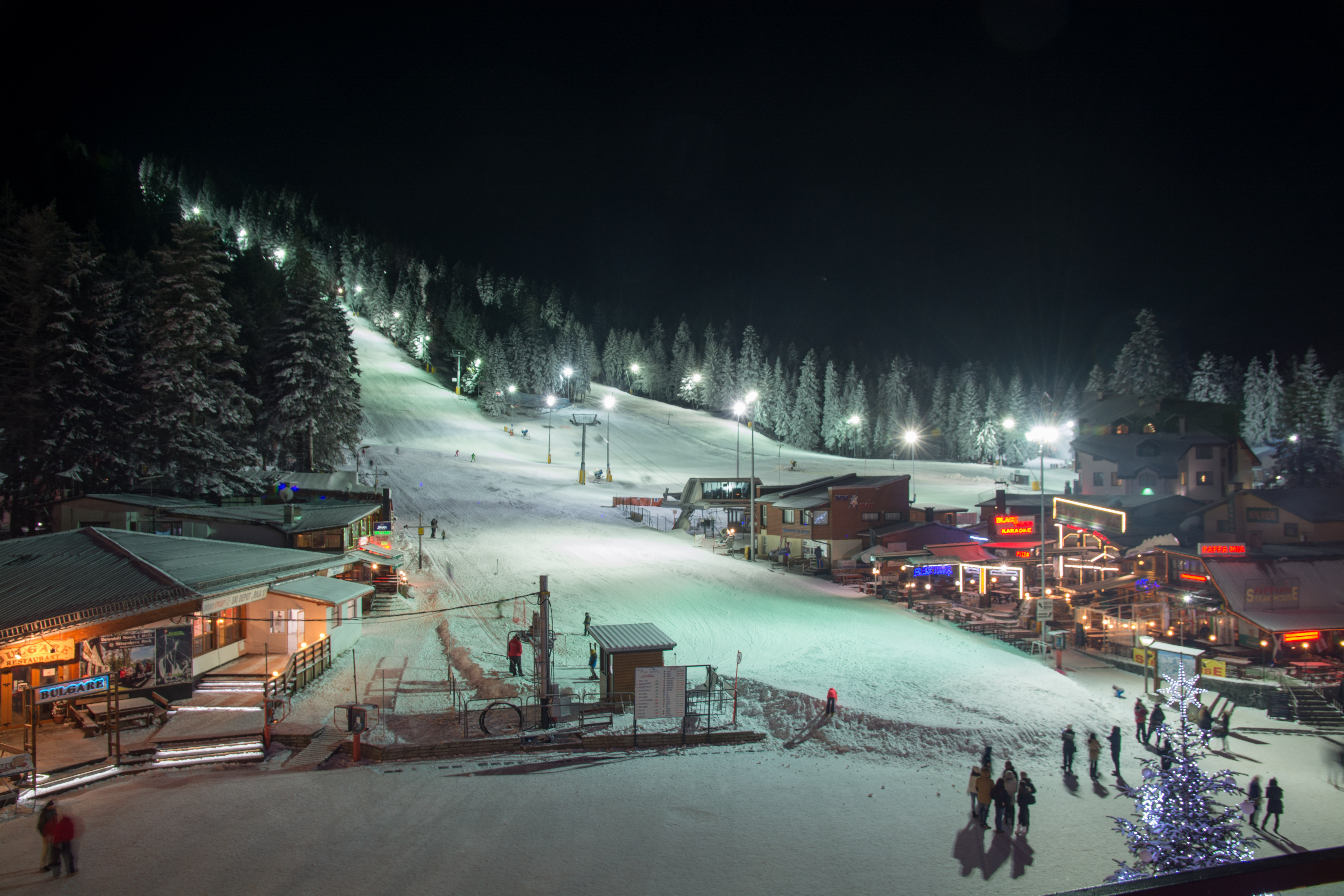 Боровец, 01.01.2016